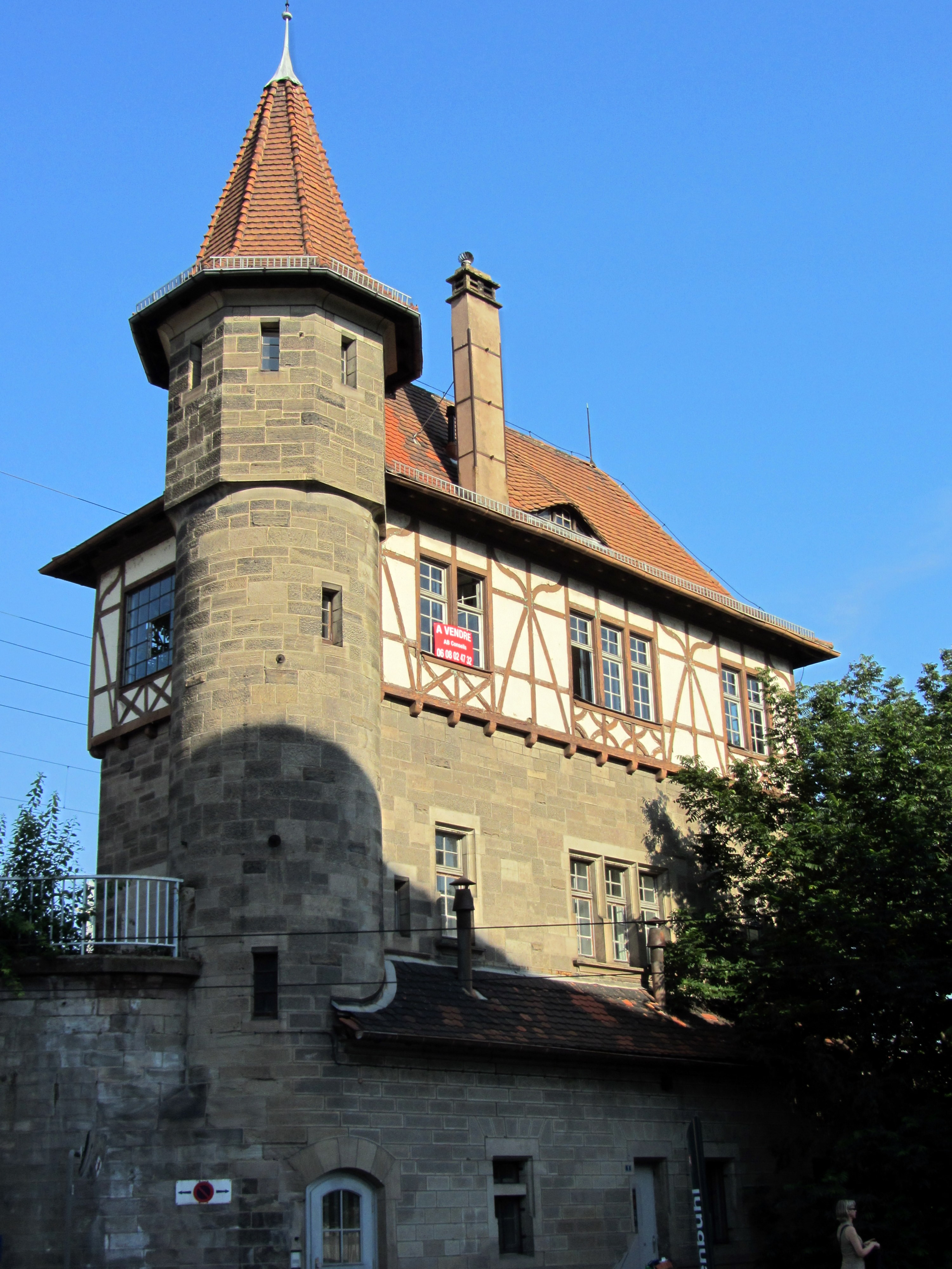 Construit en 1904, cet ancien poste d'aiguillage est un des derniers à exister, avec celui de la rue de la Plaine des Bouchers. .